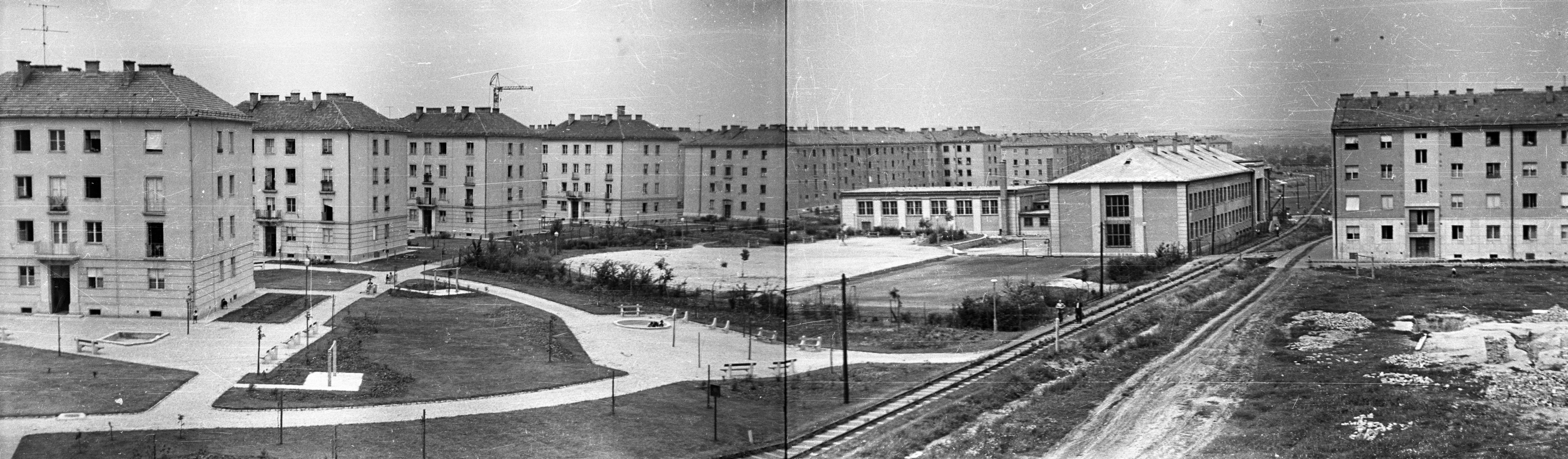 balra az Építők útja, jobbra a Rákóczi téri házak hátsó homlokzata. Location: Hungary Title: balra az Építők útja, jobbra a Rákóczi téri házak hátsó homlokzata.